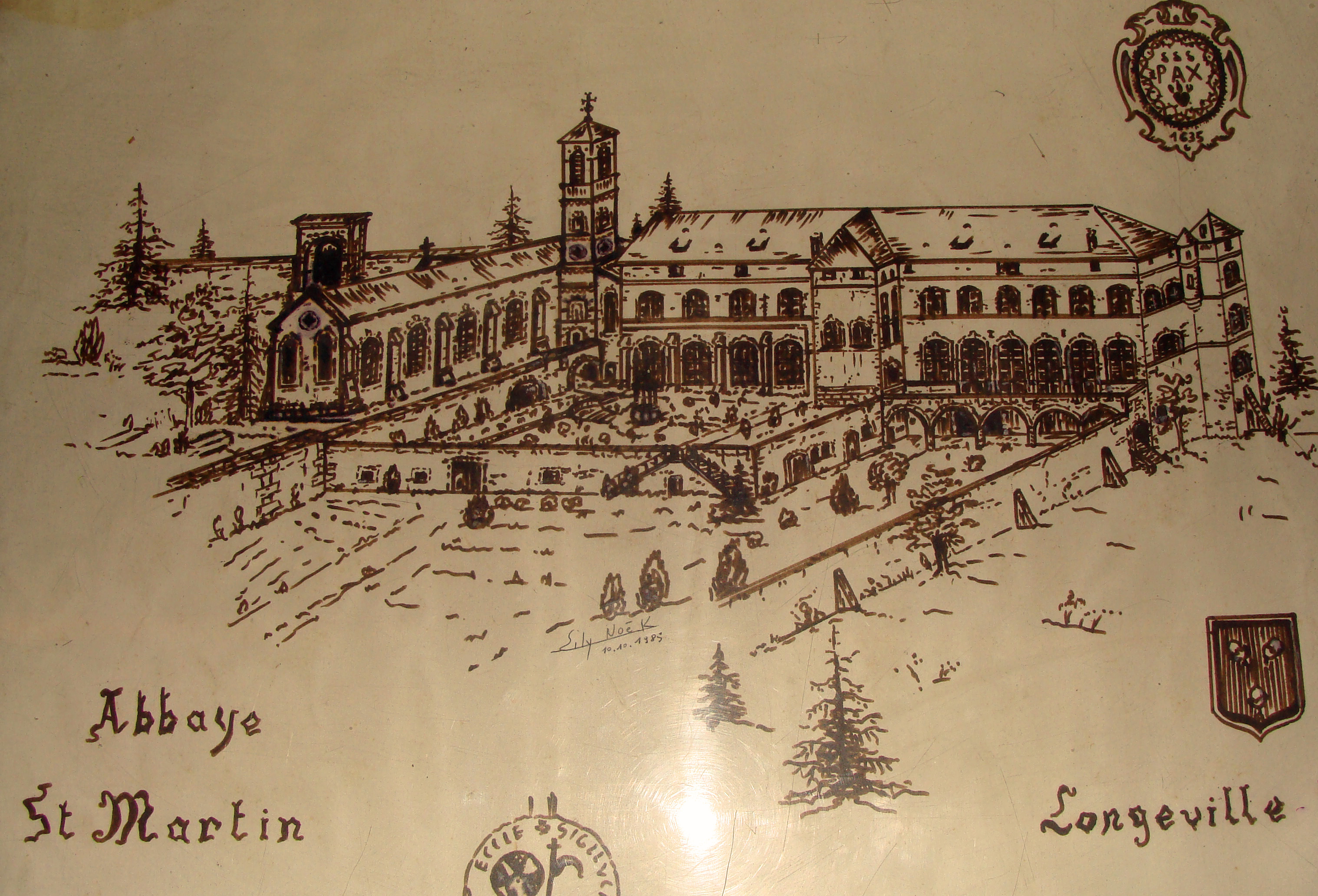 Abbaye Saint-Martin-des-Glandières, vue générale ancienne.